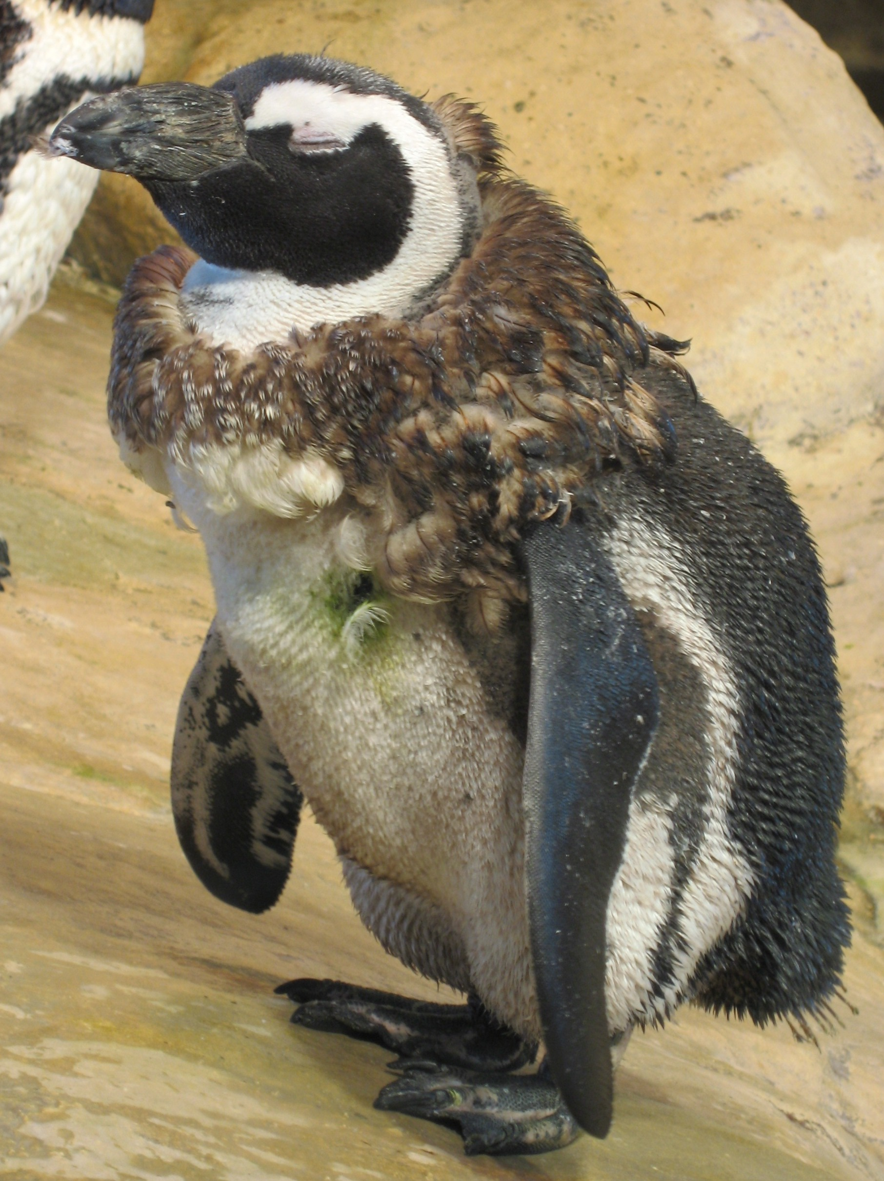 Spheniscus demersus moulting (en mue) in Nausicaä Centre National de la Mer